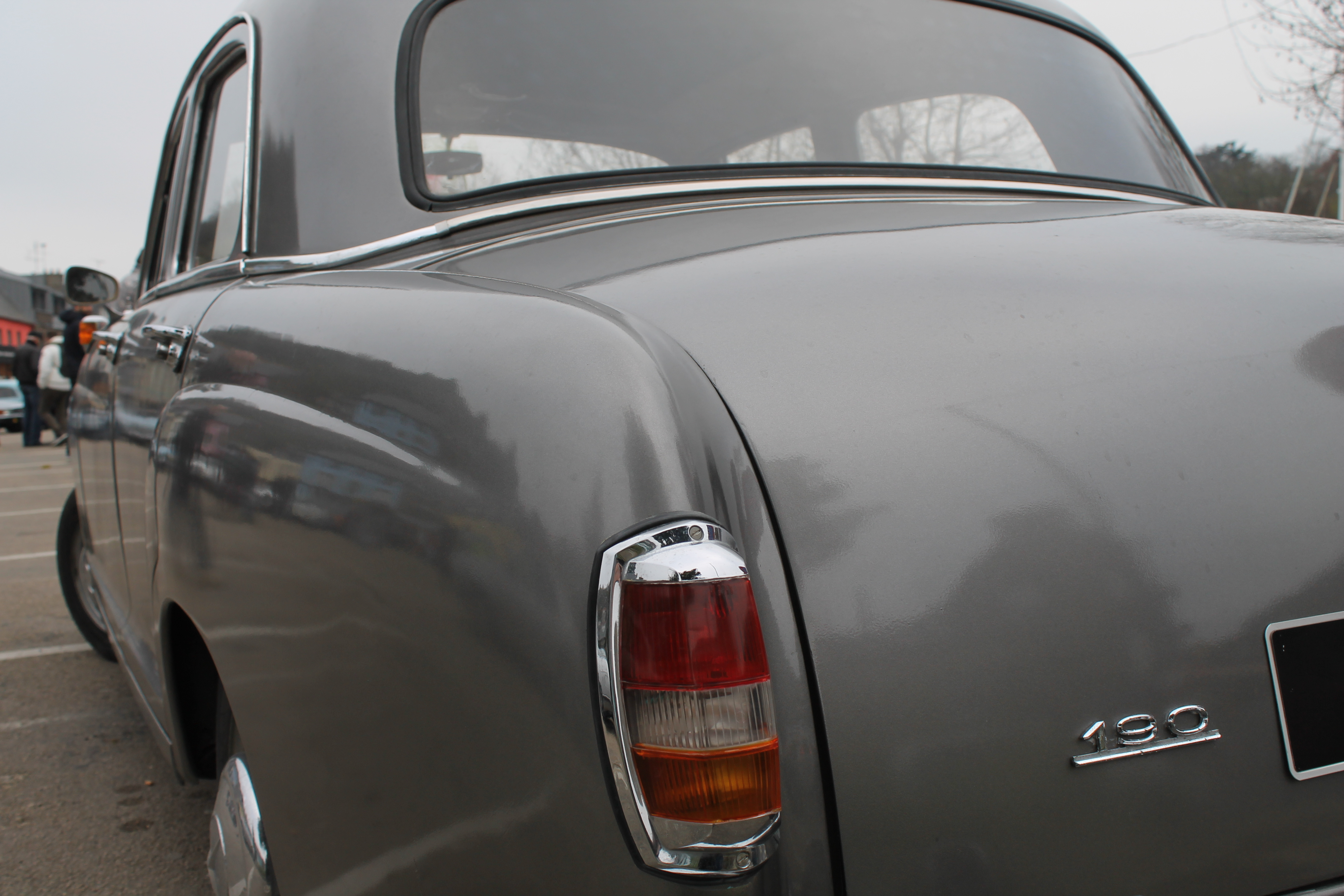 Mercedes-Benz Ponton - détail feux ar